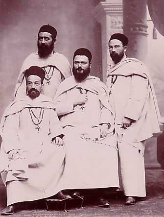 Départ via Marseille pour le Soudan des Pères blancs du cardinal Lavigerie le 25 décembre 1894. Assis de g. à dr. le Père Ficheux et le Père Augustin Hacquard (supérieur et futur vicaire apostolique); debout le Père Éveillard et le Père Dupuis.